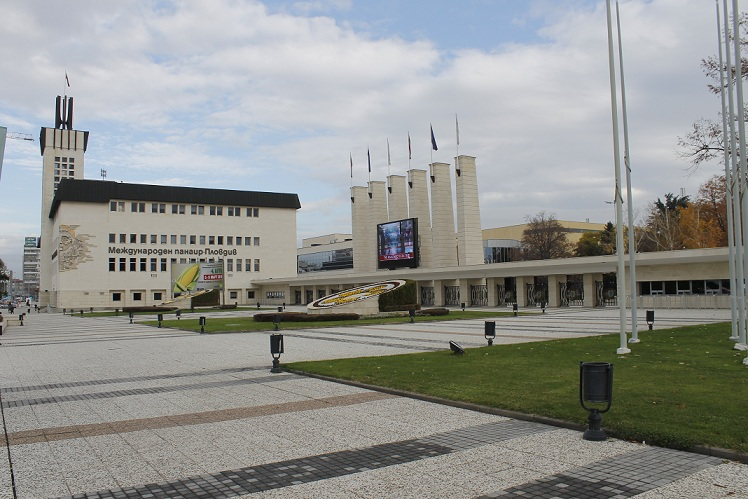 Входа и Административната сграда на Пловдивския Панаир